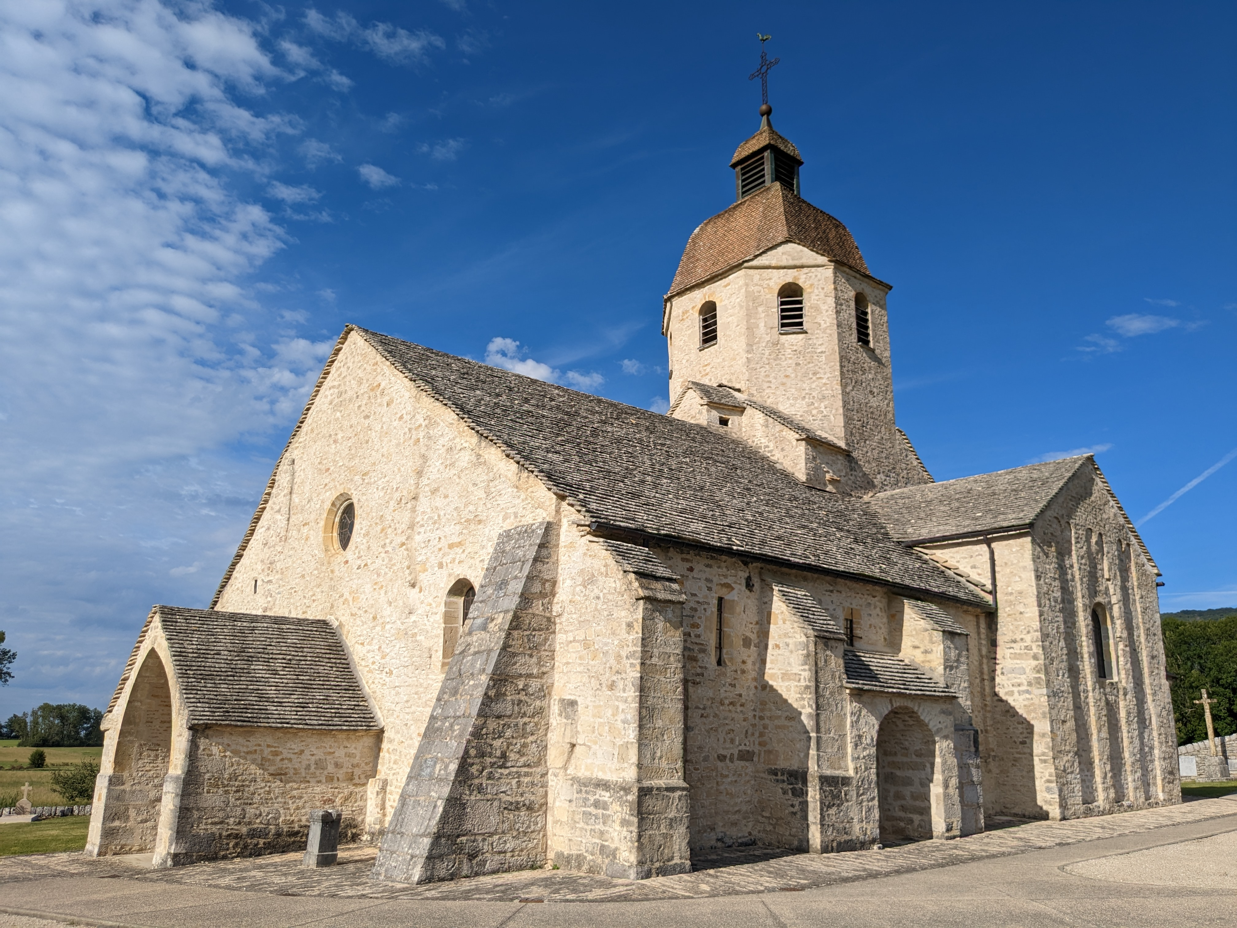 Eglise romane de Saint Hymetière (Petite Montagne, sud d'Arinthod). Milieu du XIème siècle. Hymetière, moine de Condat (St Claude), se retira ici dans un ermitage au VIème siècle. Ses reliques sont dans une chasse dans l'église. Une particularité : le clocher octogonal.